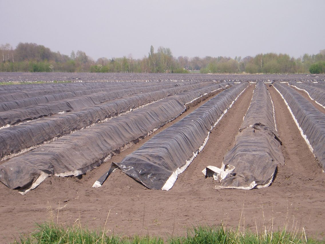 Aspergesveld in Reusel (Voorste Heikant)